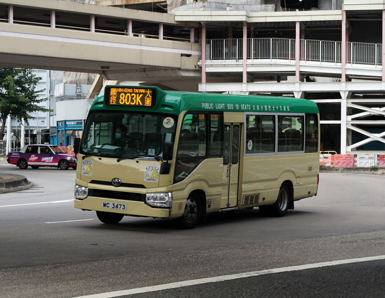 中文（香港）: 新界區專線小巴803K線，正途經大圍站外迴旋處